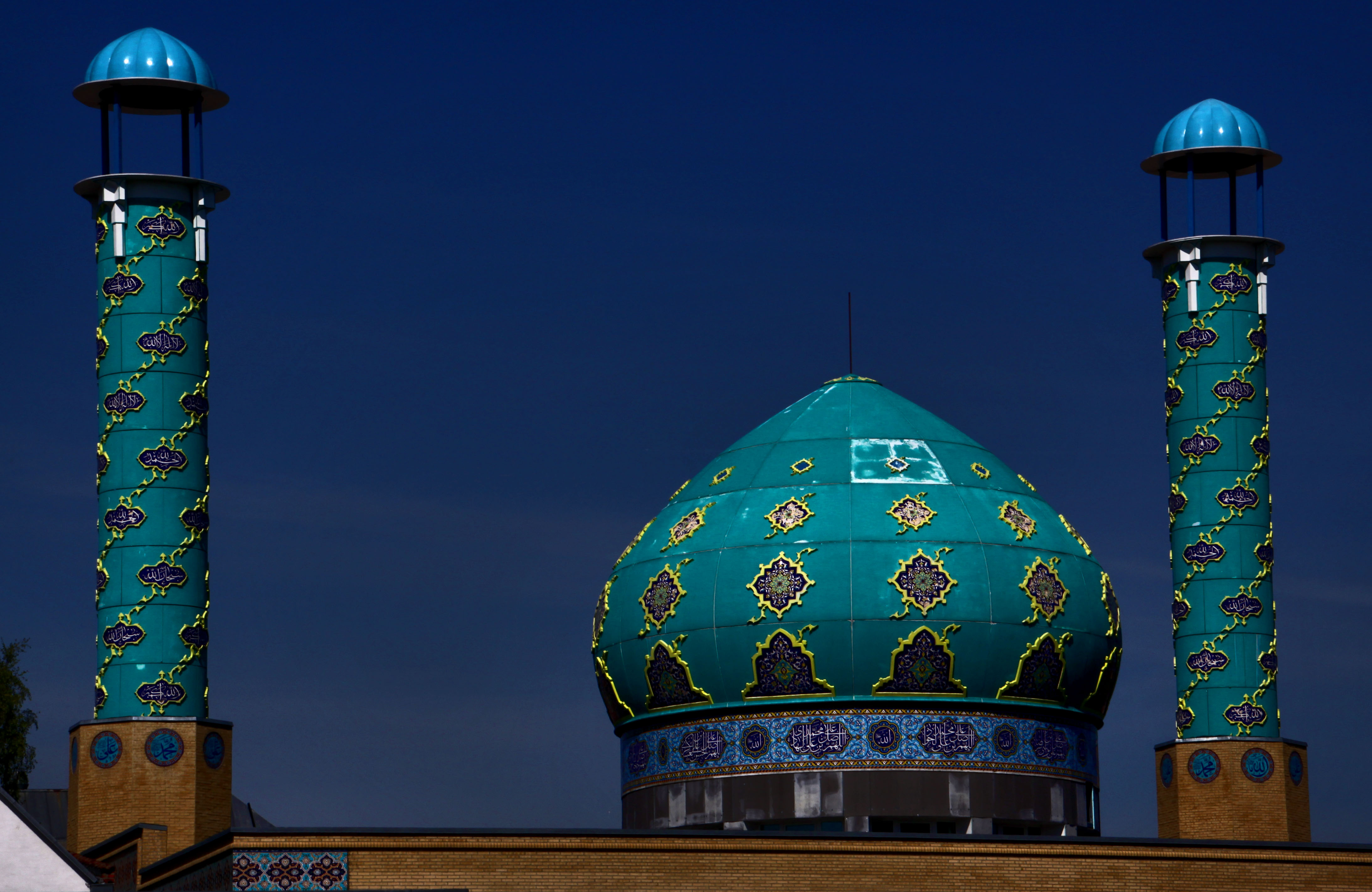 København / Copenhagen. Imam Ali Moské i Nørrebro.